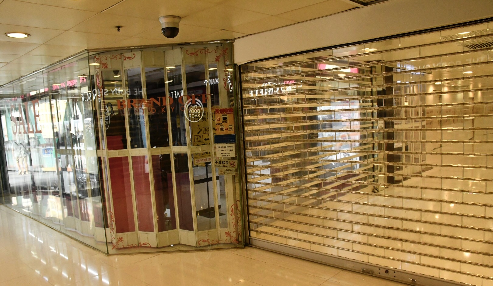 中文（中国大陆）: 元朗警署對面的元朗廣場，7月22日受網上流傳黑社會刀手再施襲消息影響，商舖暫停營業，只開放連接行人天橋的通道。